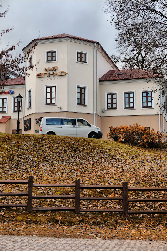 Замалёўкі Мінска